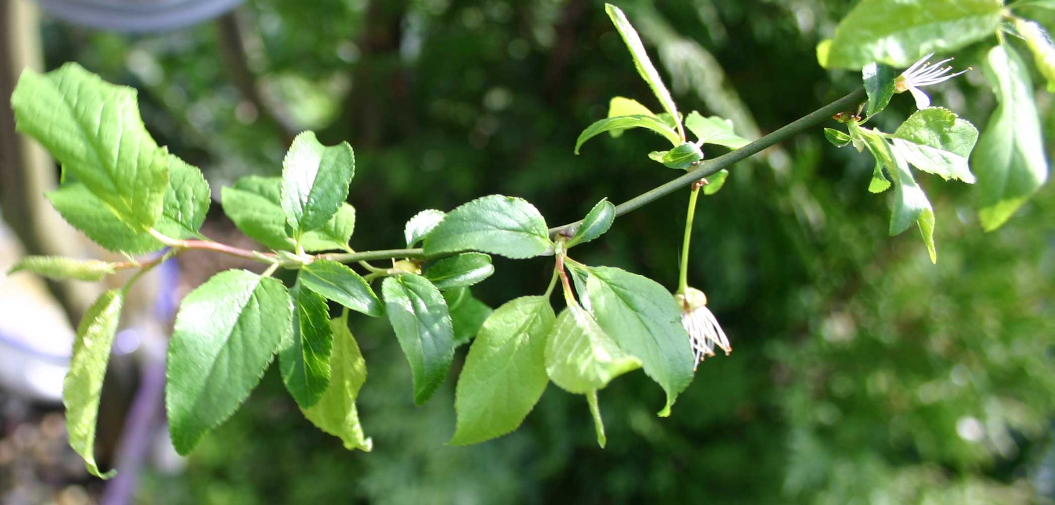 Zweig